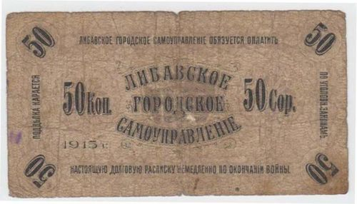 Музей: Гродзенскі дзяржаўны гісторыка-археалагічны музей Тып: рэчавыя помнікі Від: баністыка Прадметнае імя: распіска пазыковая Назва/аўтарская назва: "50 копъекъ" Матэрыялы: папера; Тэхналогіі стварэння: друк; Дата стварэння: 1915 г. Месца стварэння: Расійская Імперыя Памеры: 57 х 105 мм